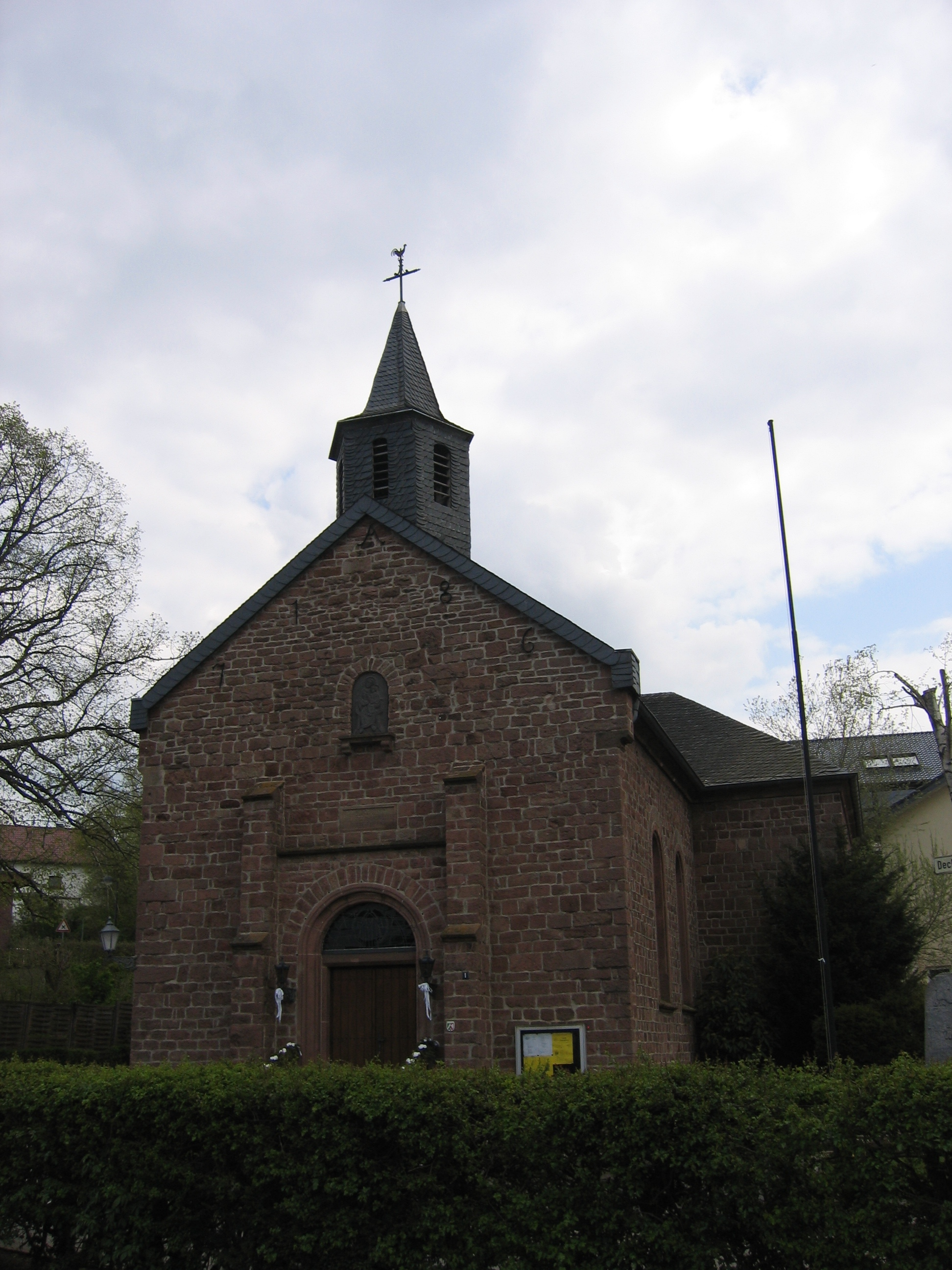 Ortskapelle in Üdingen